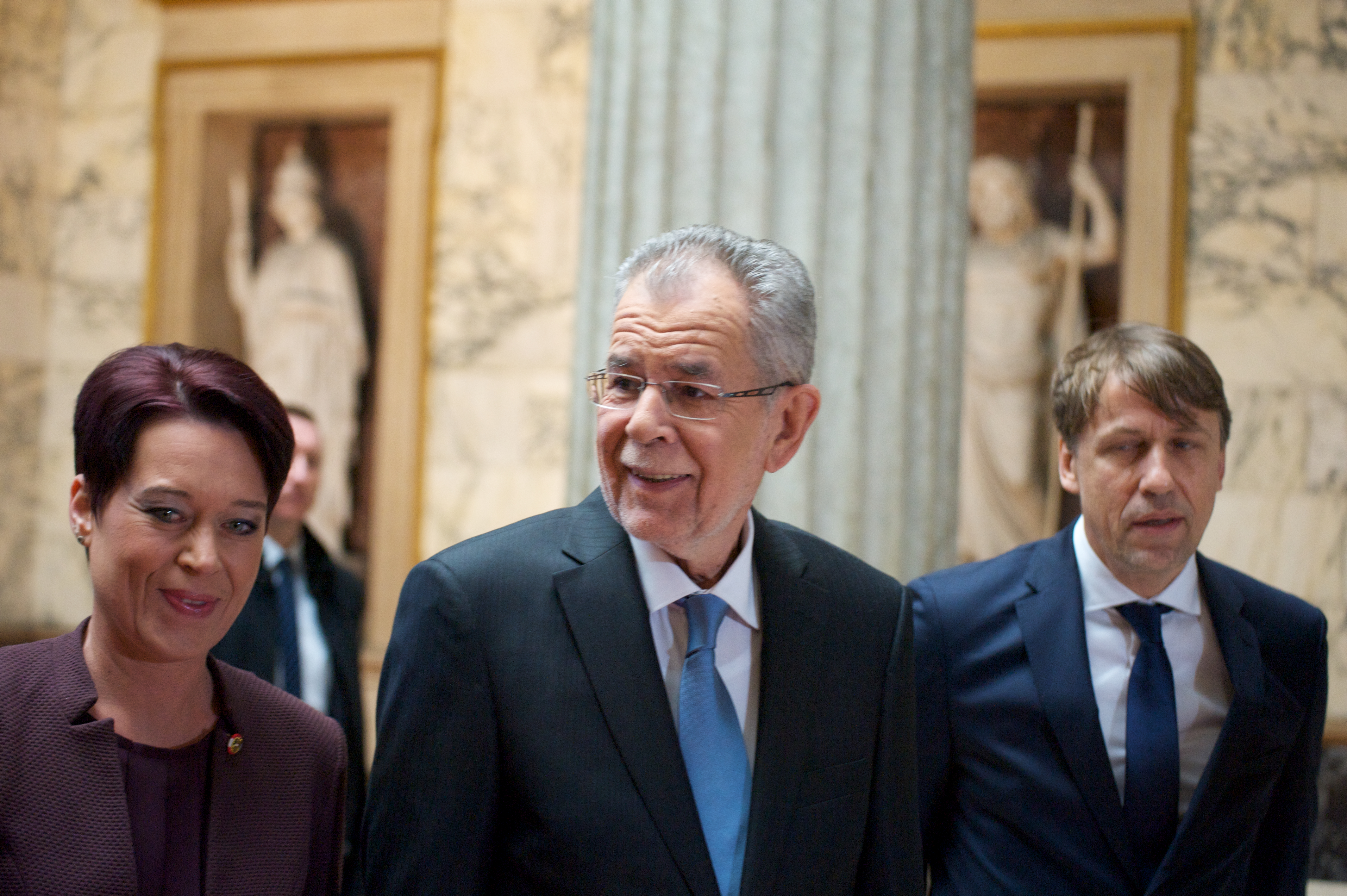 Die Präsidentin des Bundesrates Sonja Ledl-Rossmann empfängt Alexander Van der Bellen zur seiner Angelobung zum Bundespräsidenten.